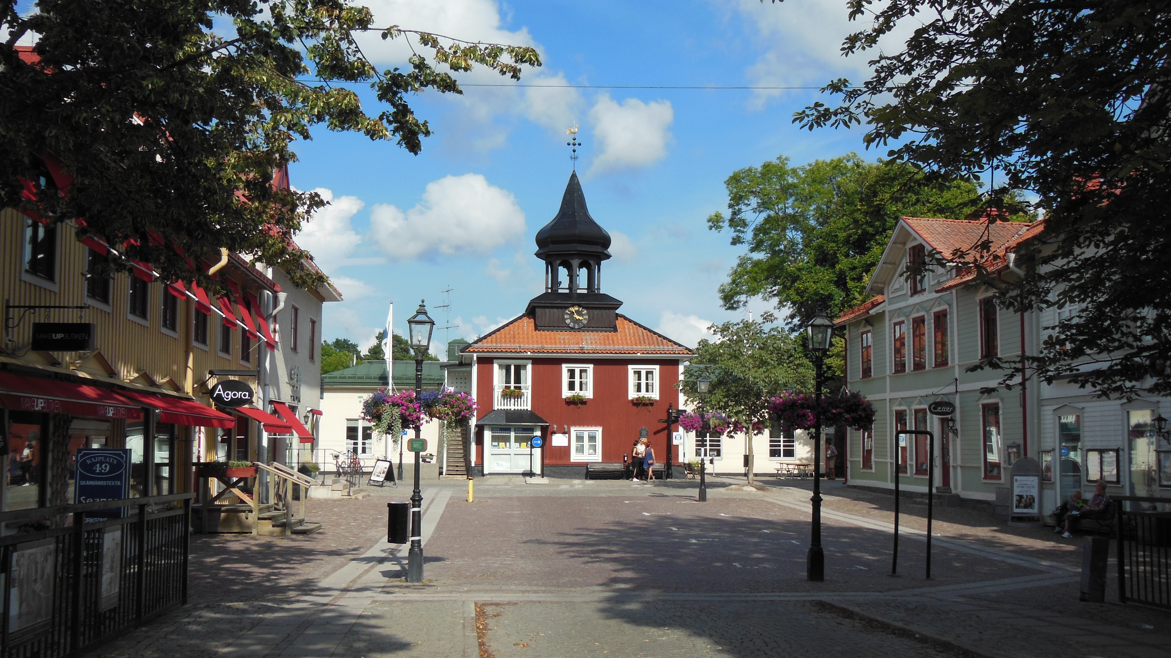 Das hölzerne Rathaus von Tros